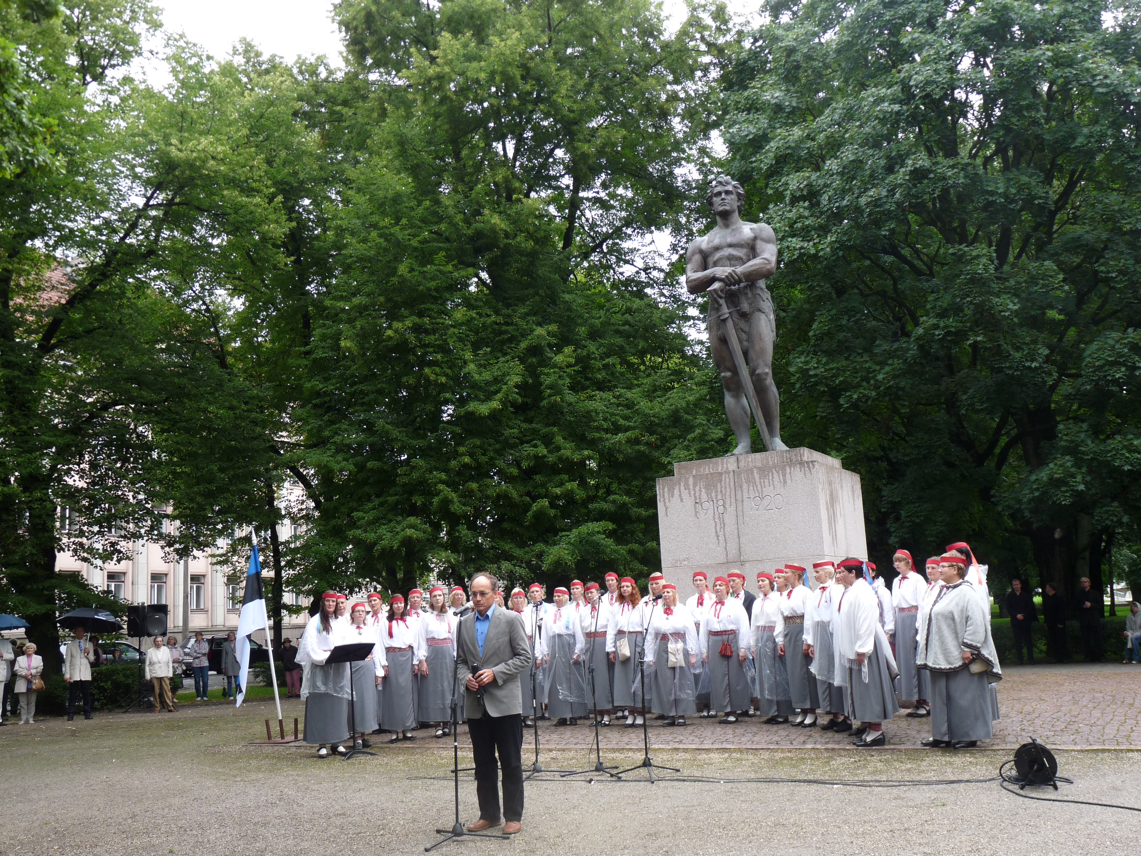 Ajaloolane Eero Medijainen esinemas Eesti taasiseseisvumispäeva puhul Tartu vabadussamba ees, tema taga naiskoor Emajõe Laulikud, 20. august 2012. Foto:Oop.